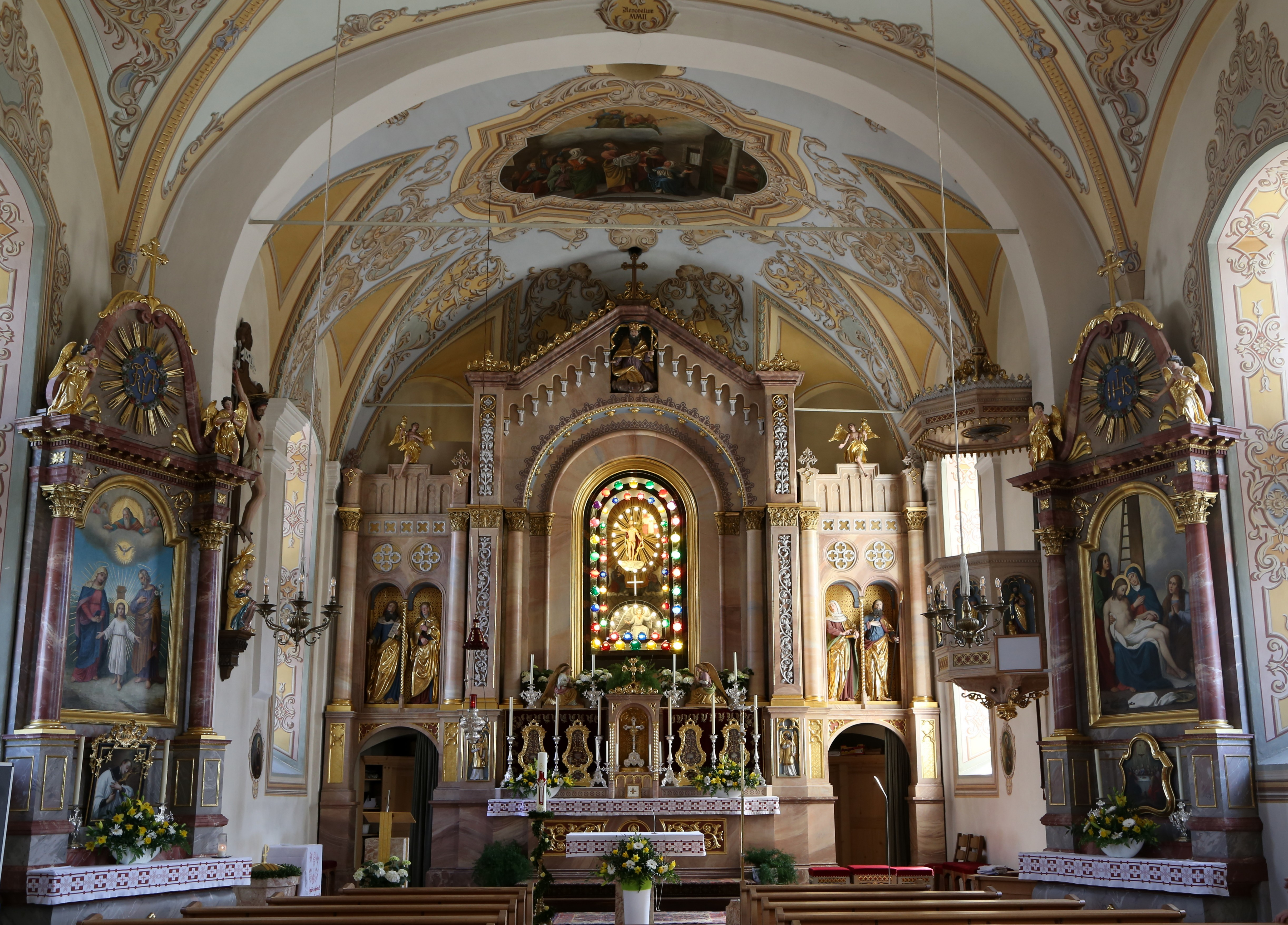 Pfarrkirche Sankt Johannes der Täufer, Walchsee This media shows the remarkable cultural object in the Austrian state of Tyrol listed by the Tyrolean Art Cadastre with the ID 2356. (on tirisMaps, pdf, more images on Commons)